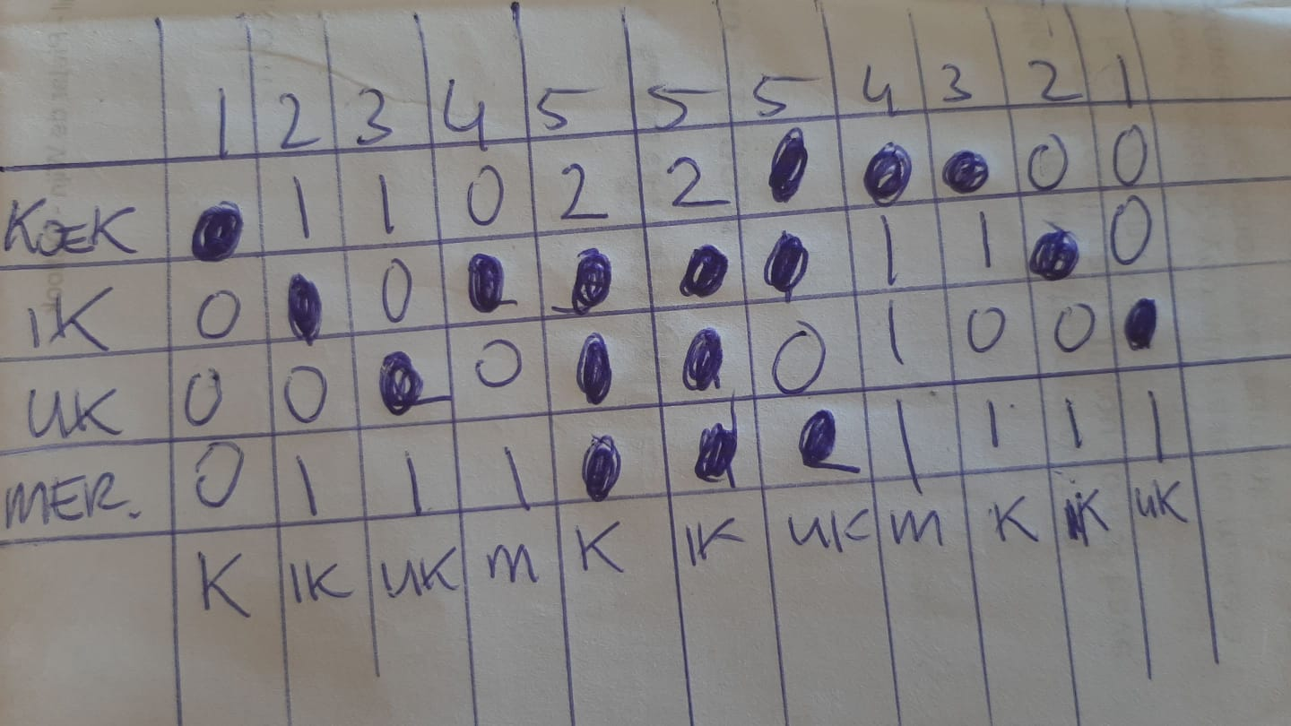 Een ingevuld bolformulier